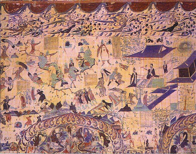 中文（中国大陆）: 敦煌壁画中之北周士兵作战图